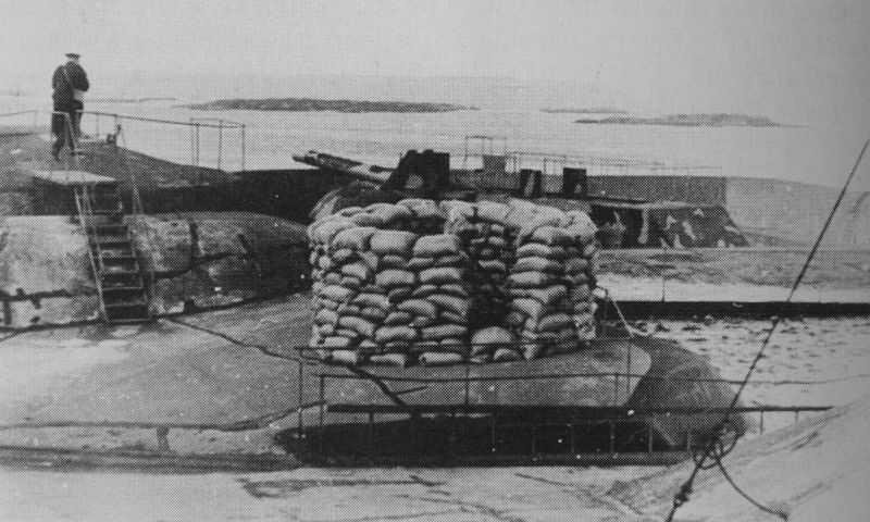 Batteri 02 på Oscar II:s fort 1939, med en 24-cm kanon i självsänkande lavettage.